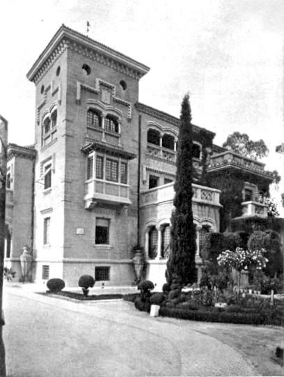 Un aspecto exterior de los magníficos Estudios cinematográficos Roptence, inaugurados el pasado sábado en Madrid, en la calle del Príncipe de Vergara, de Madrid.